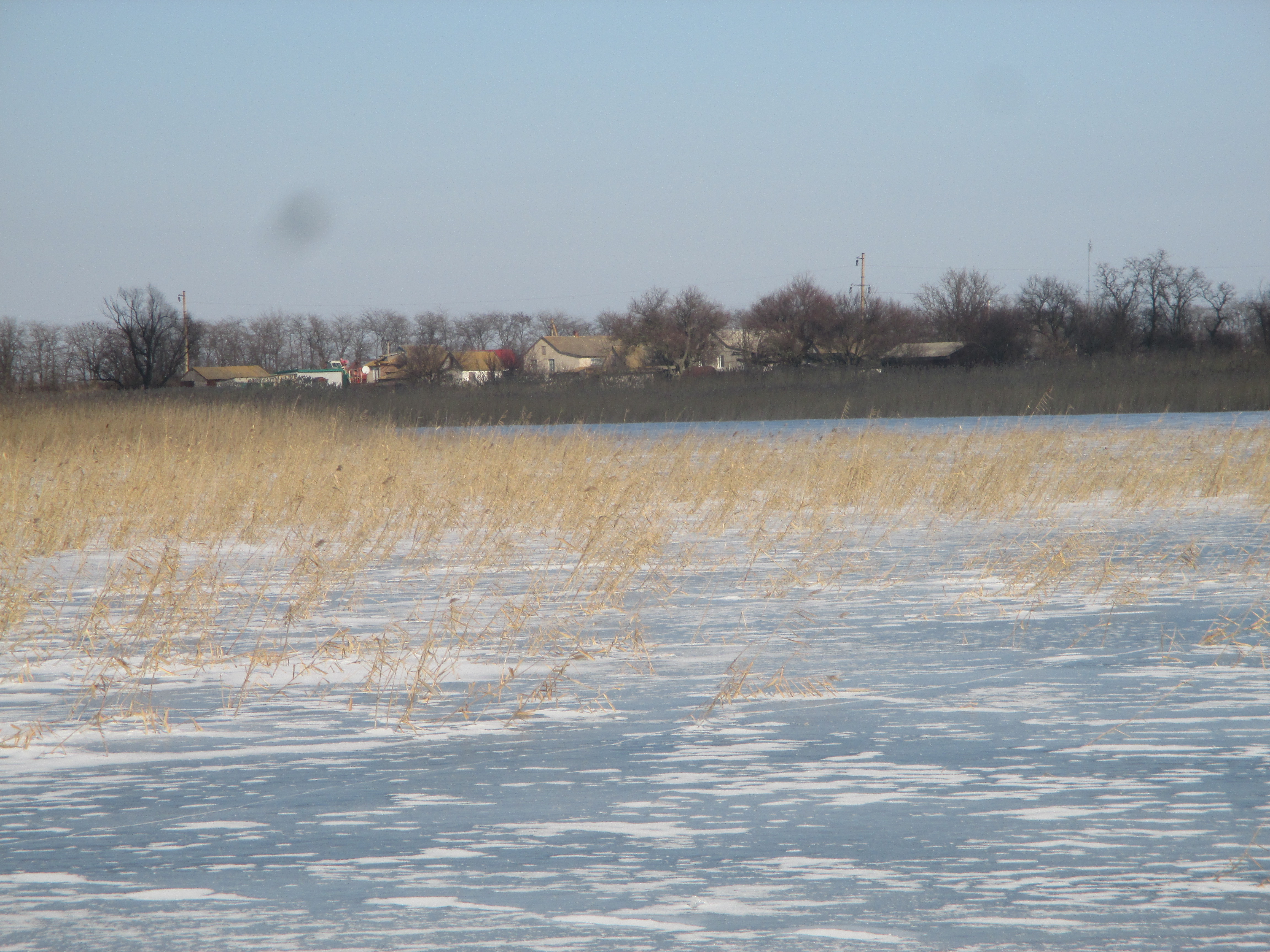 Біля Села